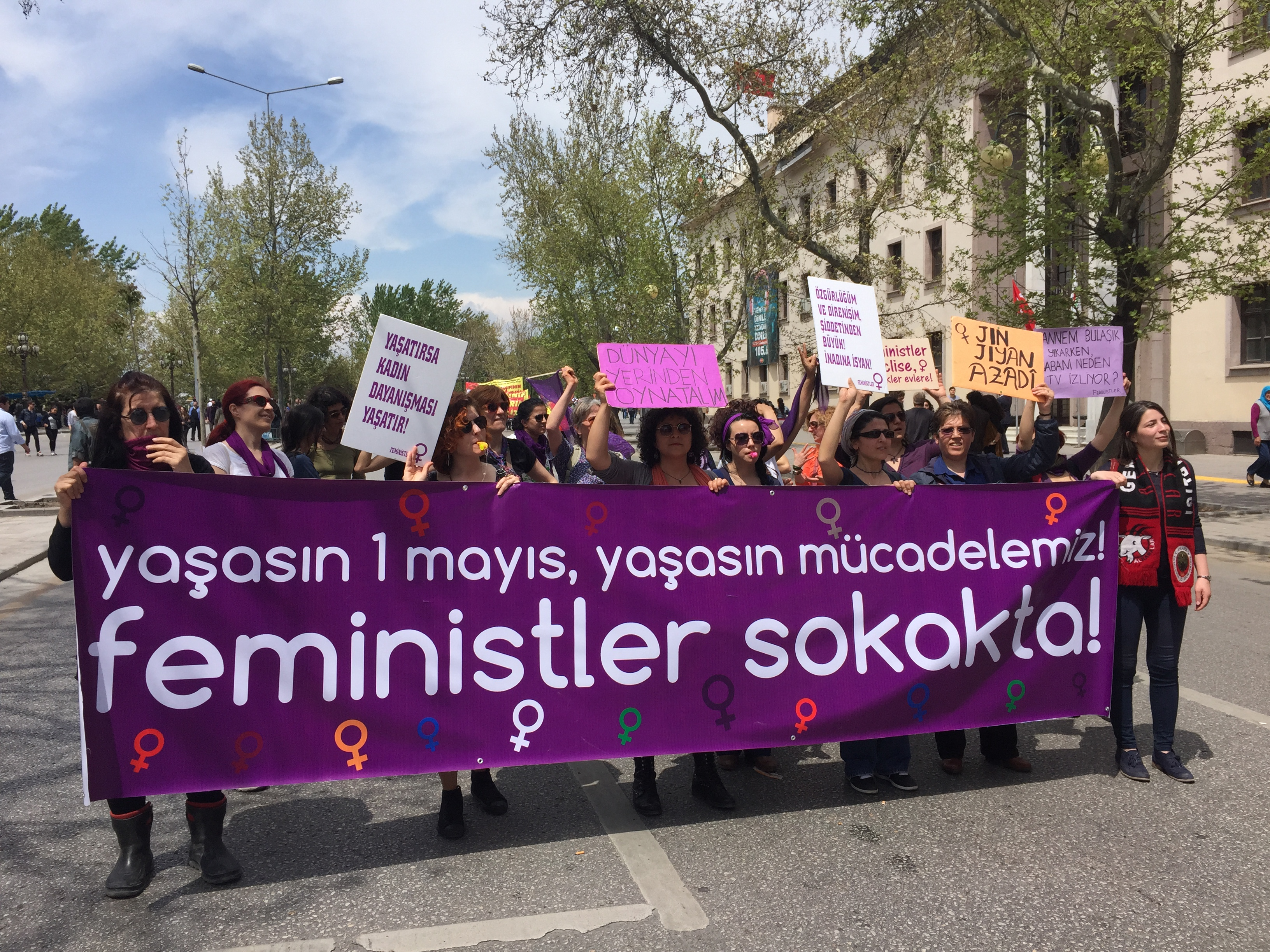 1 May 2015 demonstration